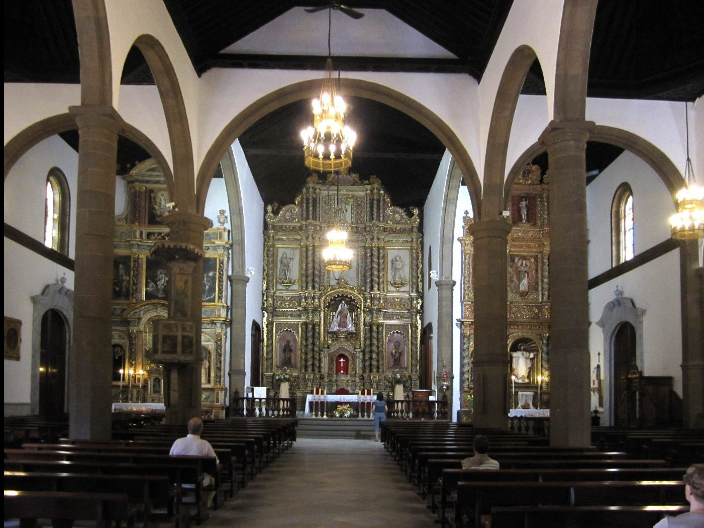 Teneriffa, Puerto de la Cruz, Iglesia de la Pena de Francia, Innenraum, Foto 2012